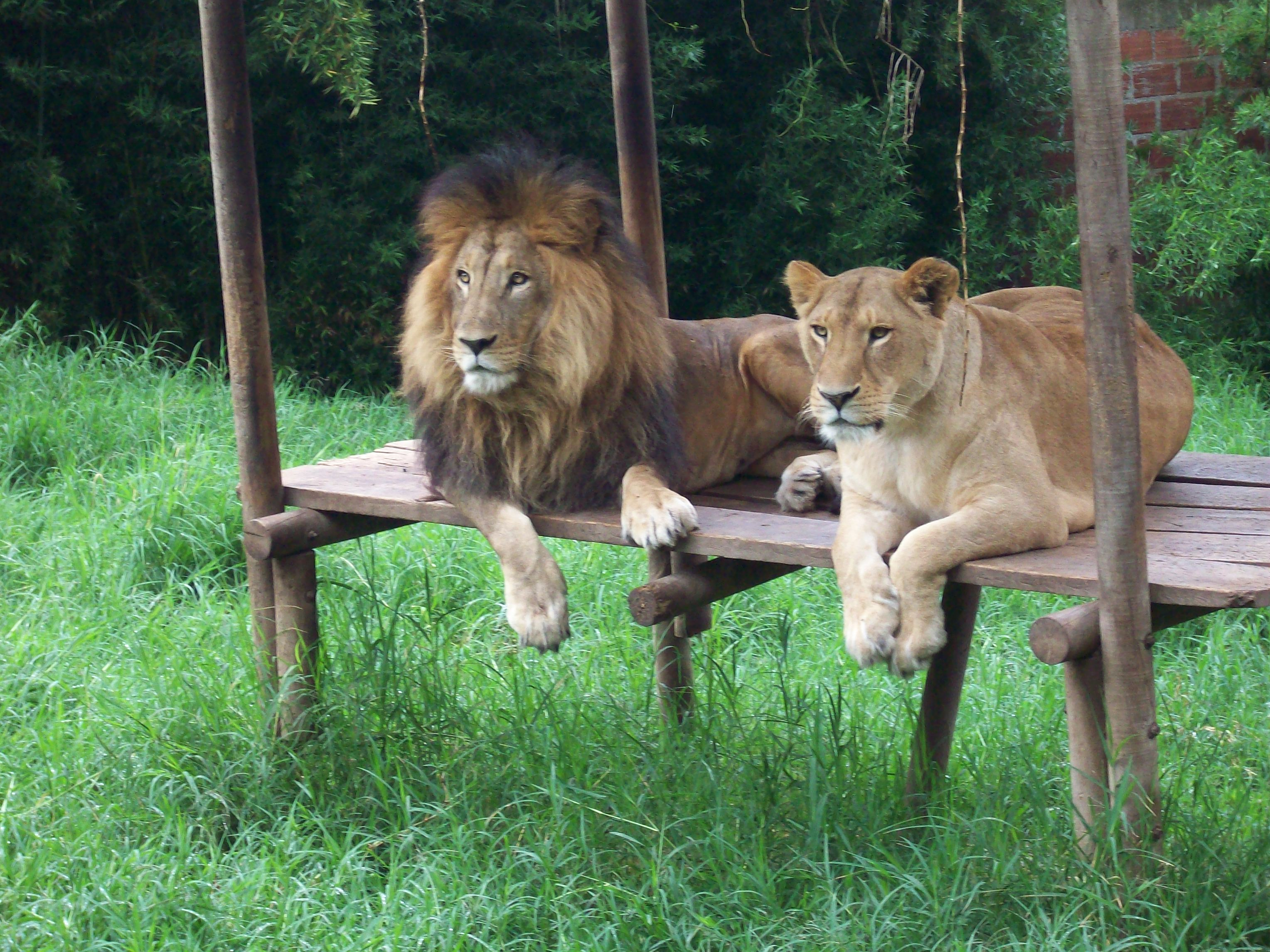 Imagen de los leones del Zoológico matecaña